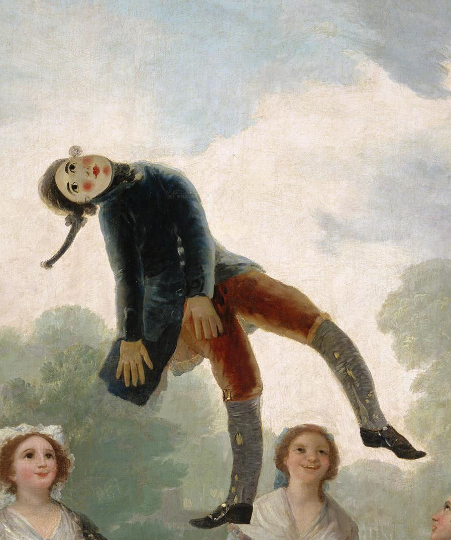 detail